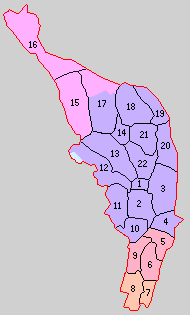 栃木県河内郡の町村。